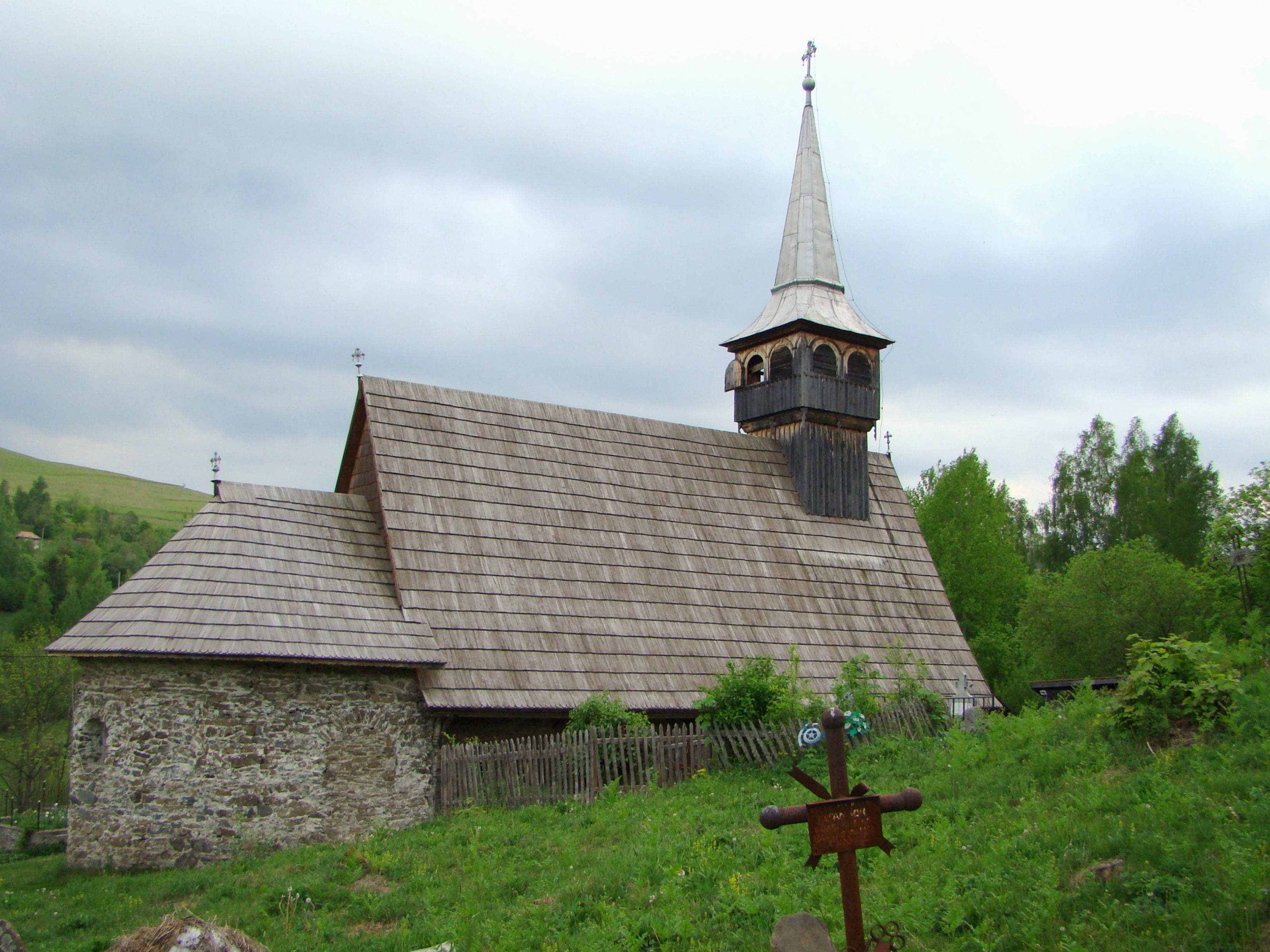 Biserica de lemn din Geogel, Alba